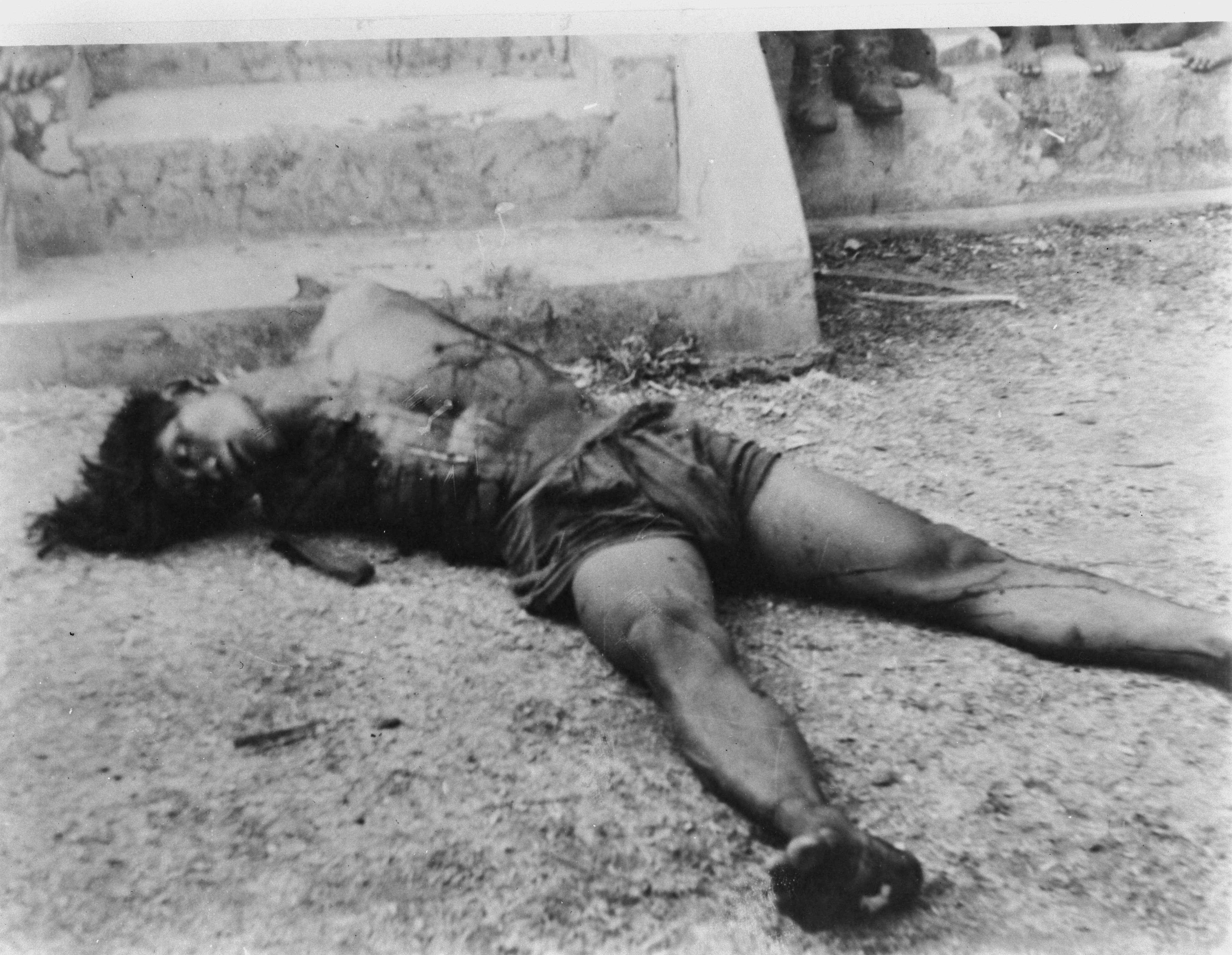 Collectie / Archief : Fotocollectie Dienst voor Legercontacten Indonesië Reportage / Serie : [DLC] Foto's gedode communisten door de TNI [gemaakt te Madioen, september 1948] Beschrijving : Lijk van een zwaar toegetakelde man ligt op de grond bij een trap. [Zijn armen lijken afgehakt of zijn op zijn rug gebonden] Datum : september 1948 Locatie : Indonesië, Madiun, Nederlands-Indië Fotograaf : Fotograaf Onbekend / DLC Auteursrechthebbende : Nationaal Archief Materiaalsoort : Negatief (zwart/wit) Nummer archiefinventaris : bekijk toegang 2.24.04.02 Bestanddeelnummer : 8823